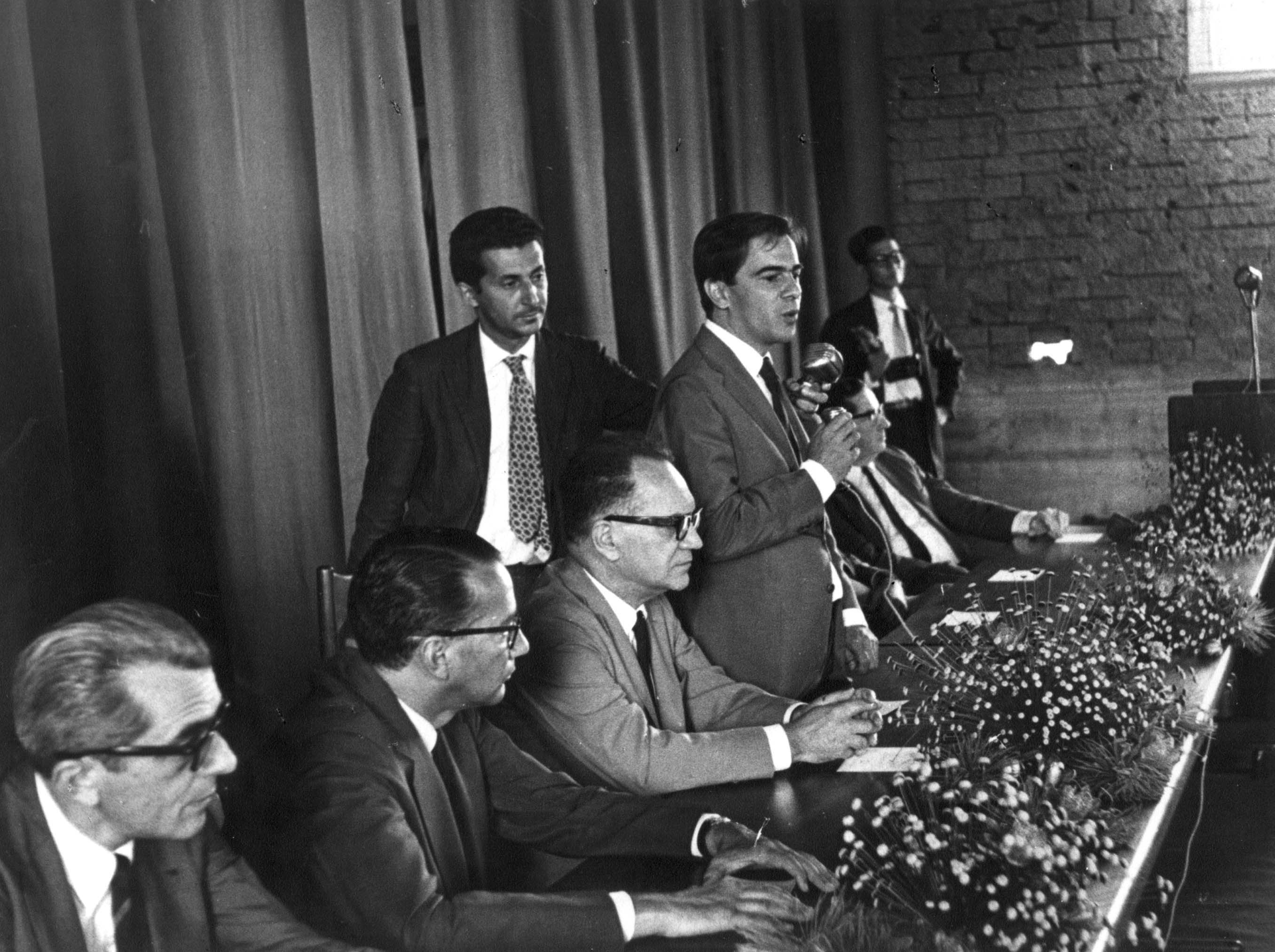 Autoridades compondo a mesa de inauguração da Universidade de Brasília. Darcy Ribeiro, em pé, discursando, segurando o microfone, no auditório Dois Candangos. 1*ANTONIO FERREIRA DE OLIVEIRA BRITO ( MINISTRO DA EDUCAÇÃO E CULTURA ) 2* SETTE CÂMARA ( PREFEITO DO DISTRITO FEDERAL ) 3* HERMES LIMA ( CHEFE DA CASA CIVIL DA PRESIDÊNCIA DA REPUBLICA ) 4* DARCY RIBEIRO ( REITOR ).